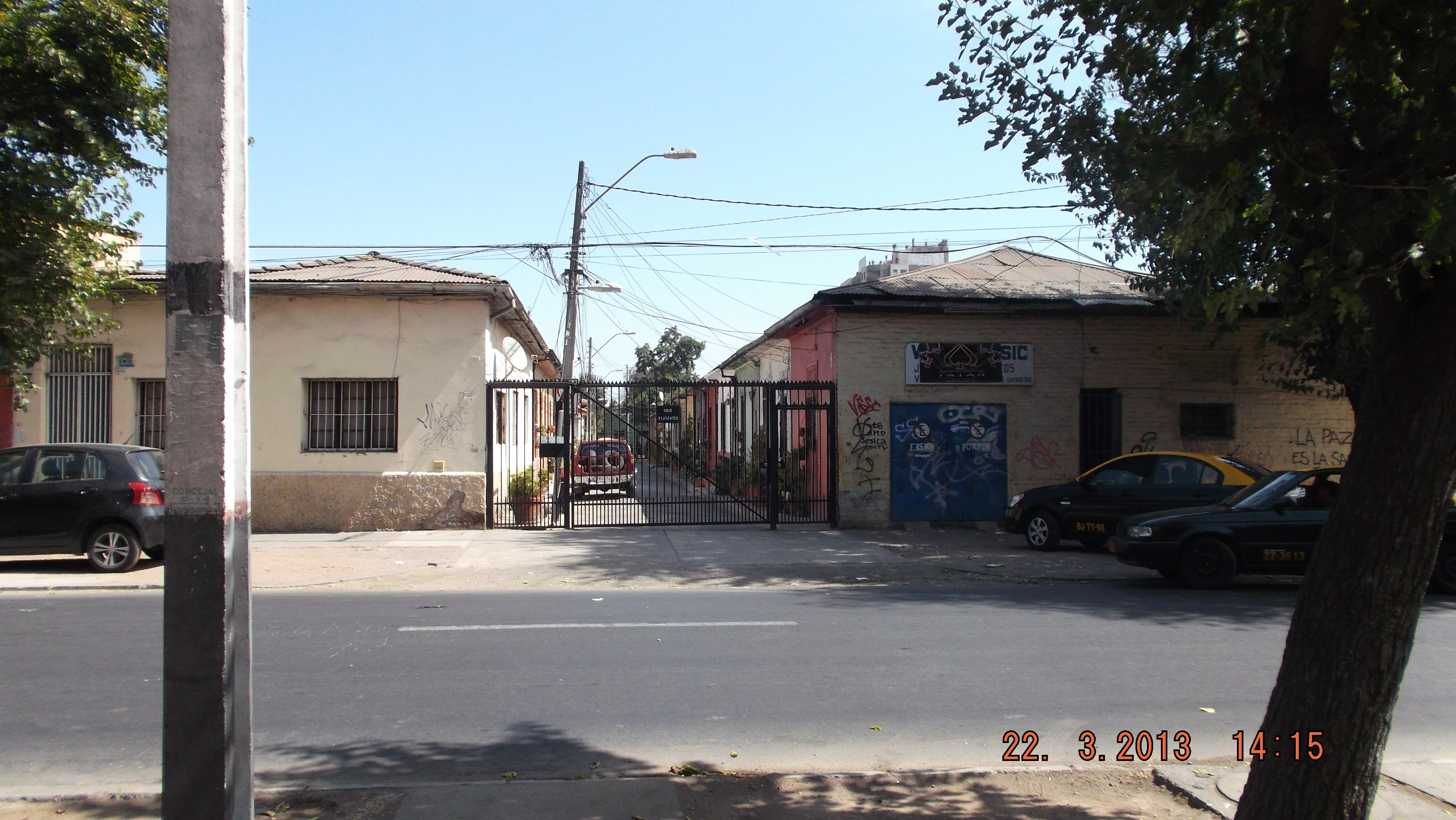 Cité donde se grabó la teleserie.